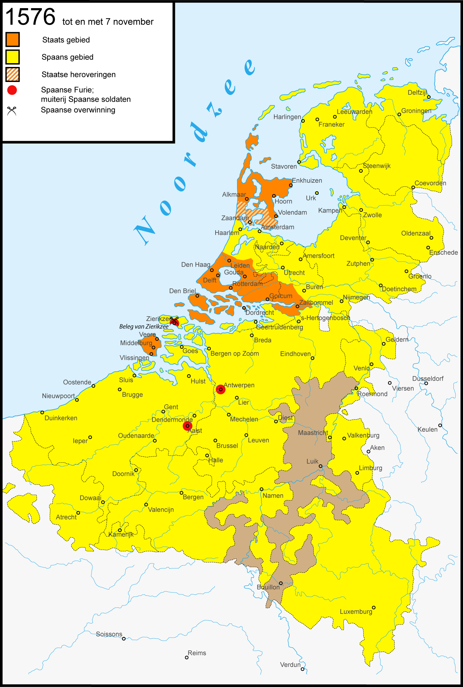 Krijgsbewegingen in de Tachtigjarige Oorlog: 1576 tot en met 7 november. Nederlandse versie Engels: Warprogression in het Eighty Years' War: 1576 till 7th November. Dutch version